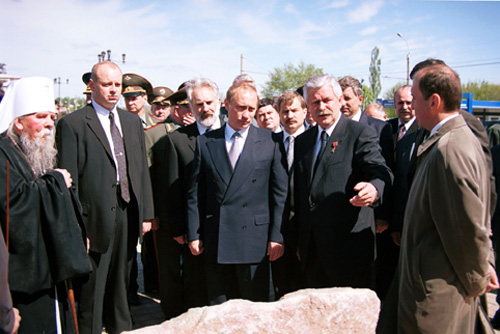 КУРСК. С губернатором Курской области Александром Руцким (в центре справа) во время открытия мемориального комплекса «Курская дуга».